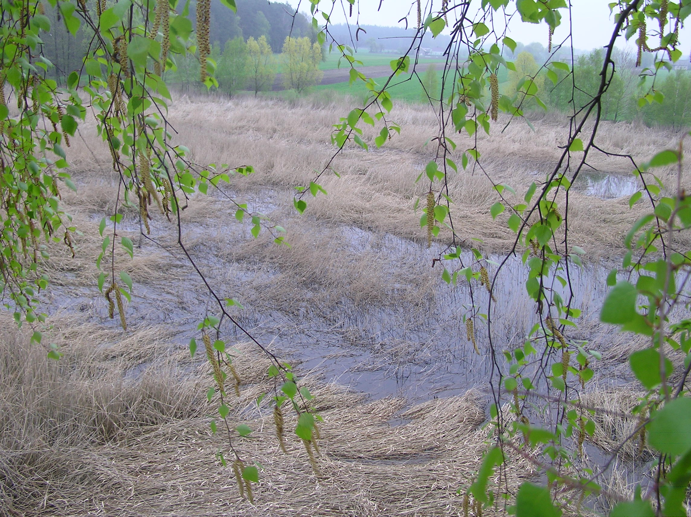 Jezioro Ług (Niemojew) - Gmina Klonowa, Gmina Lututów